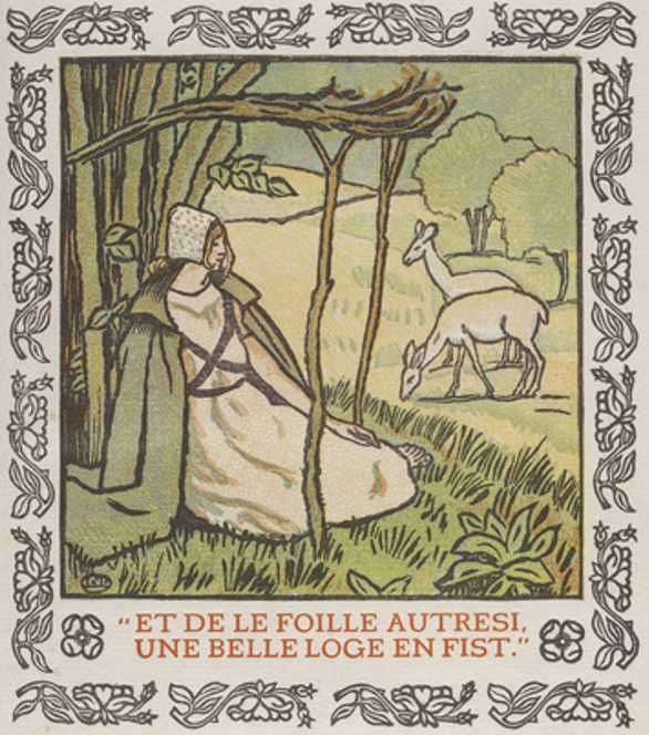 Illustration de 1903 de Lucien Pissarro pour l'ouvrage suivant : Francis William Bourdillon (Éditeur scientifique), C'est d'Aucassin et de Nicolete : illustration et ornements de Lucien Pissarro gravés sur bois par Esther et Lucien Pissarro, London-Hammersmith, The Brook, Eragny press, 1903, 55 p. : 1 ill. en coul., musique ; 22 cm